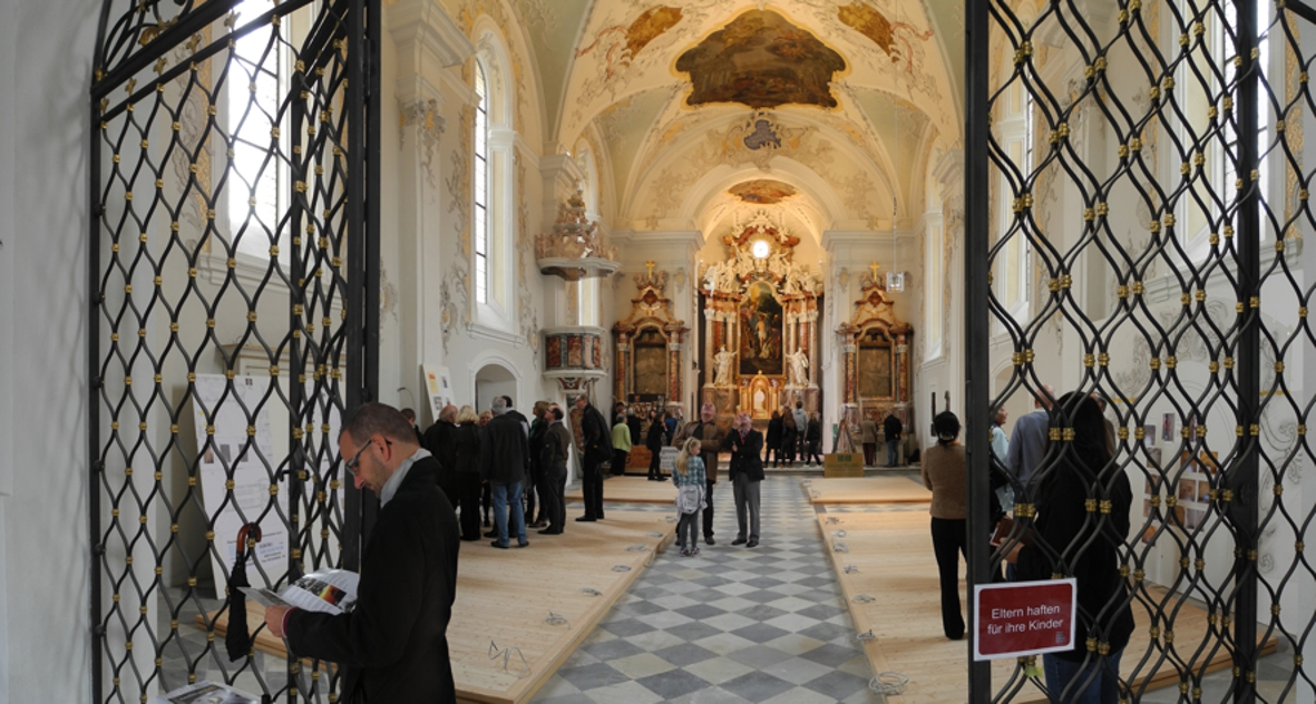 Innsbruck: Pfarrkirche zu den Hll. Pirmin, Sebastian und Rochus (Dreiheiligenkirche) Dieses Bild wurde anlässlich des österreichischen Tags des Denkmals 2012 in Tirol eingereicht.